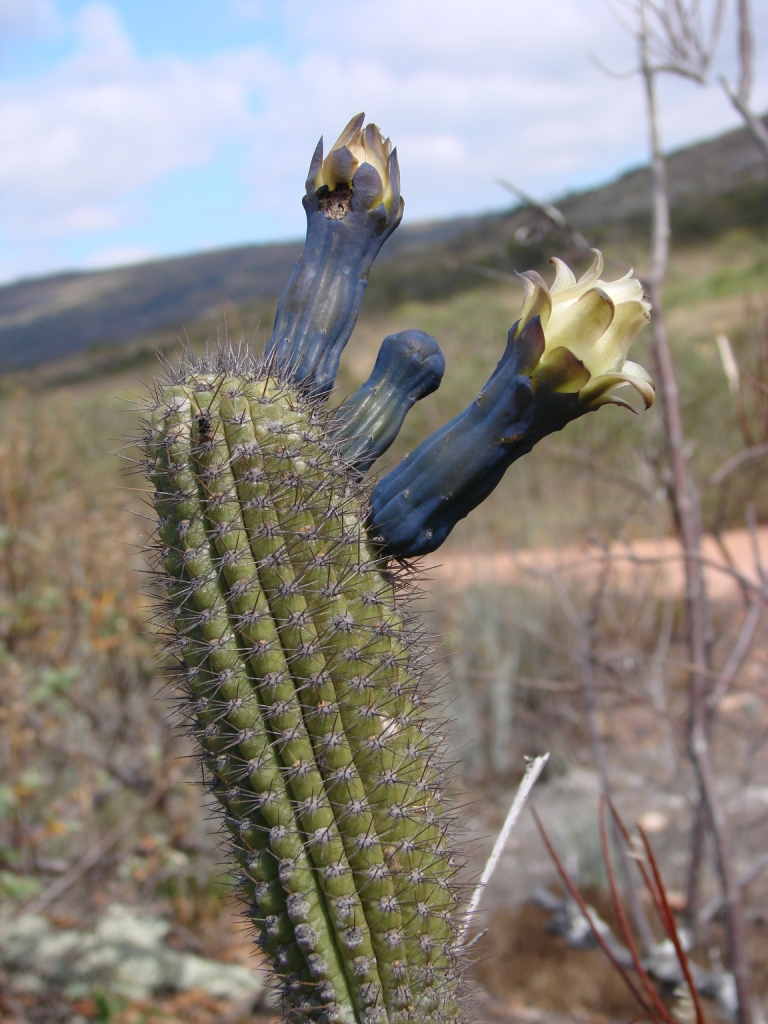 Cipocereus minensis - CACTACEAE - Parque Estadual do Biribiri - Serra do Espinhaço - Diamantina - Minas Gerais - Brasil.